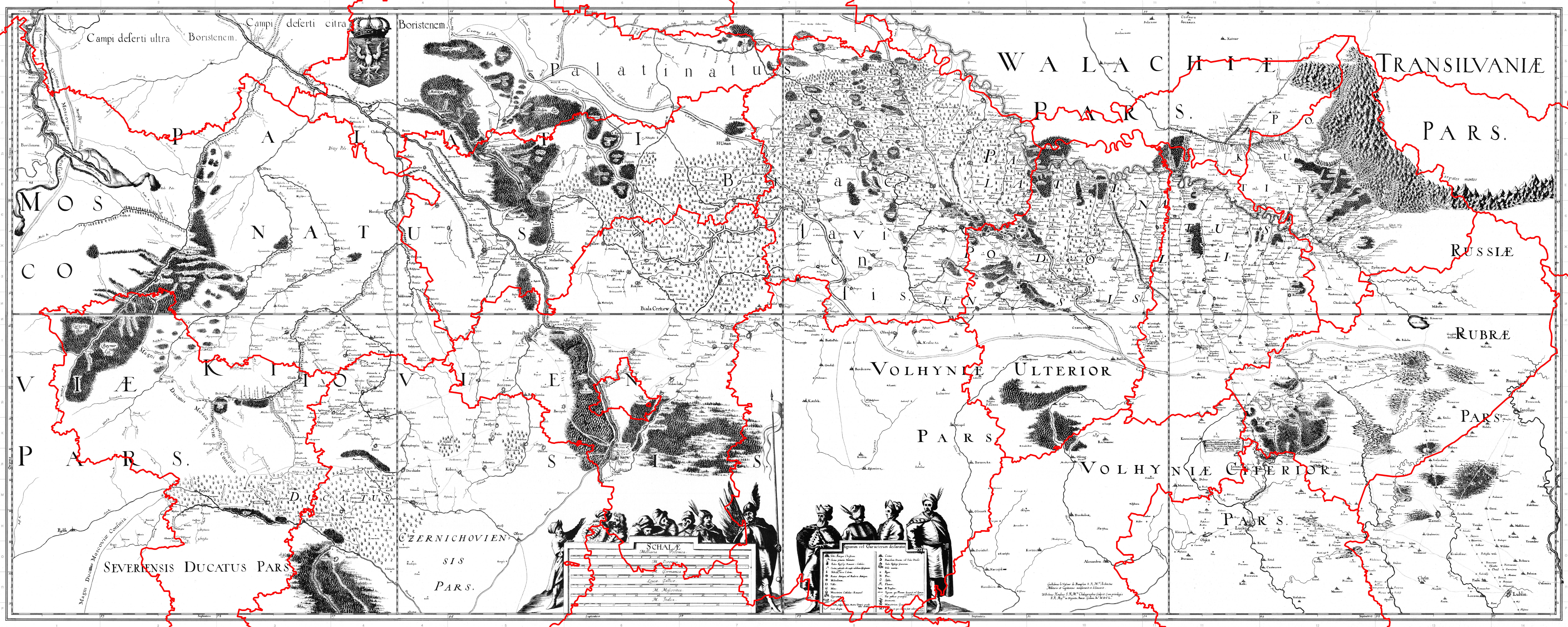 boplan-border-1650.jpg: Мапа України 1650